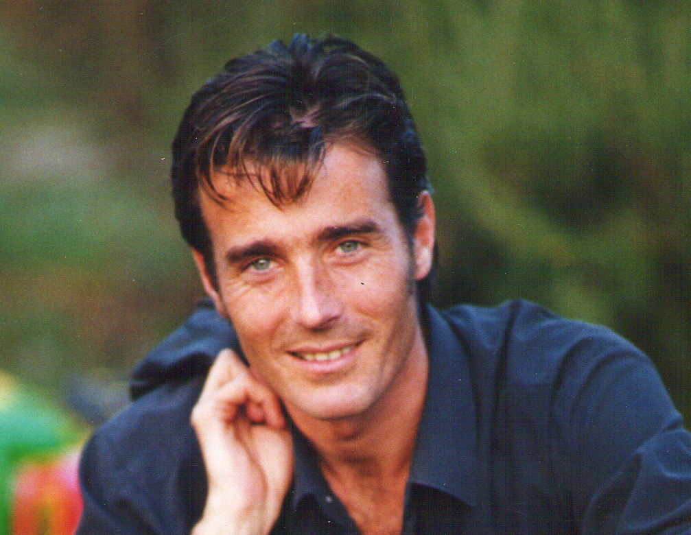 photo de David Aboucaya